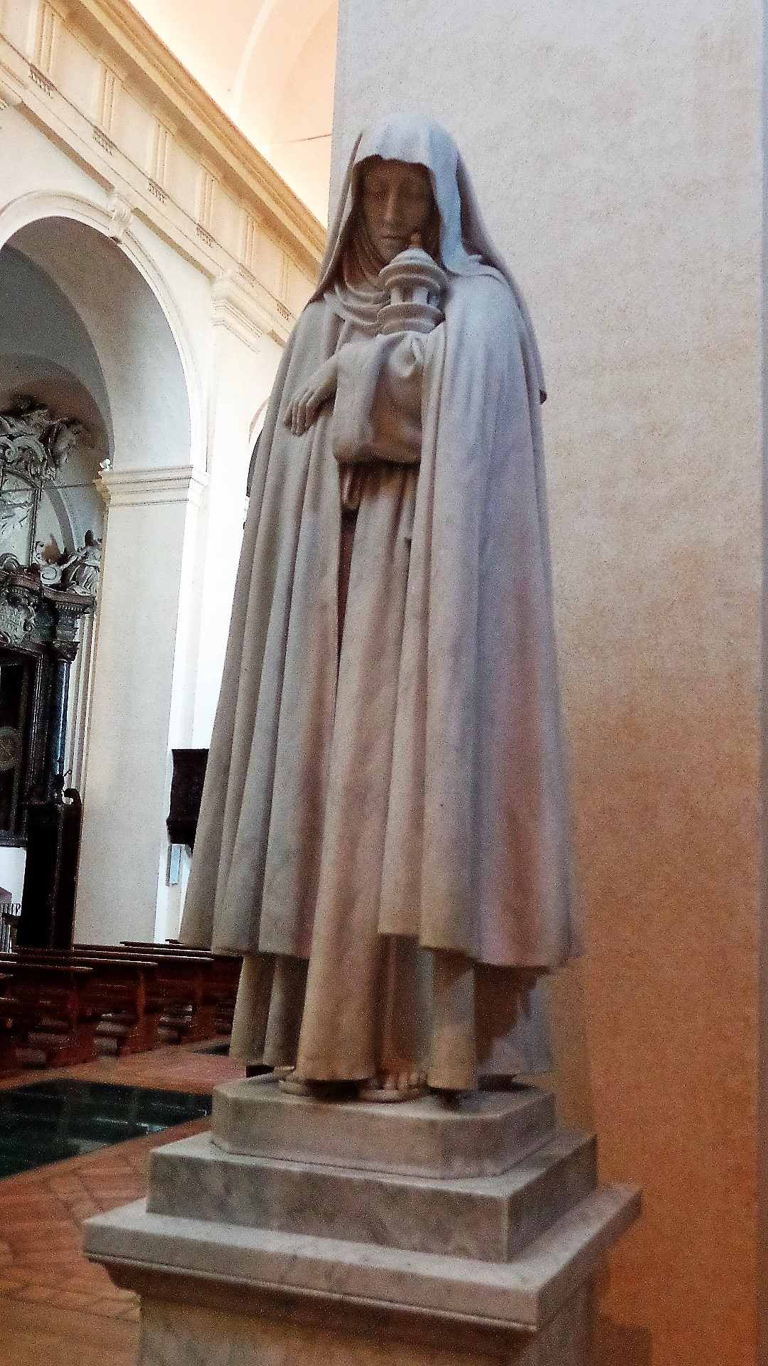 Statua